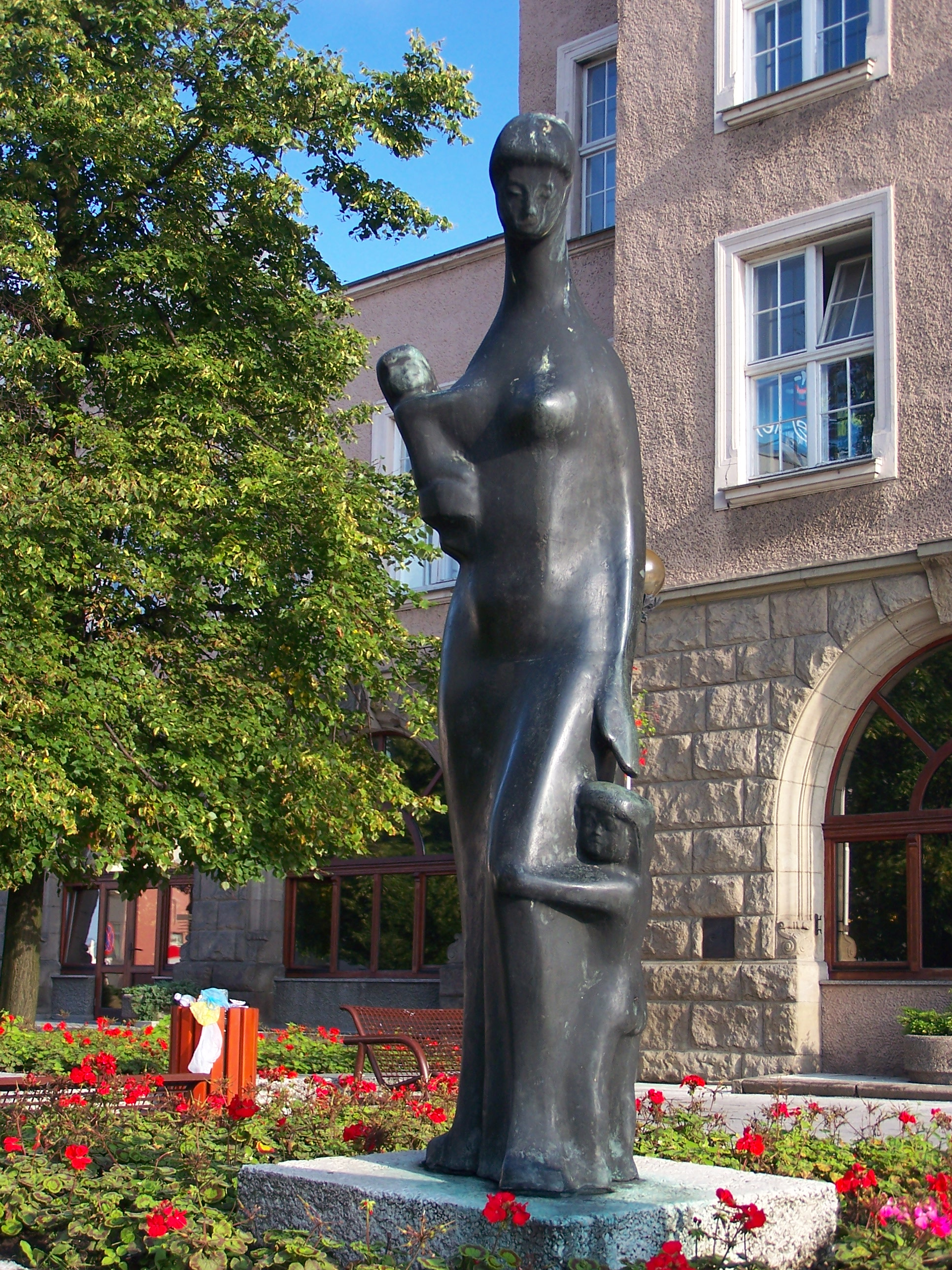 Figura kobiety z dzieckiem przed nowym ratuszem w Olsztynie